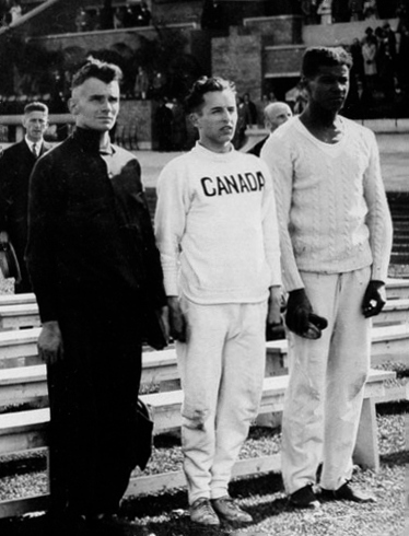 Sport. Olympische Spelen 1928 Amsterdam, Nederland : De ceremonie na de 100 meter hardlopen. Vlnr de Duitser Lammers (derde), de Canadees Percy Williams (olympisch kampioen) en de Brit Jack London (tweede).